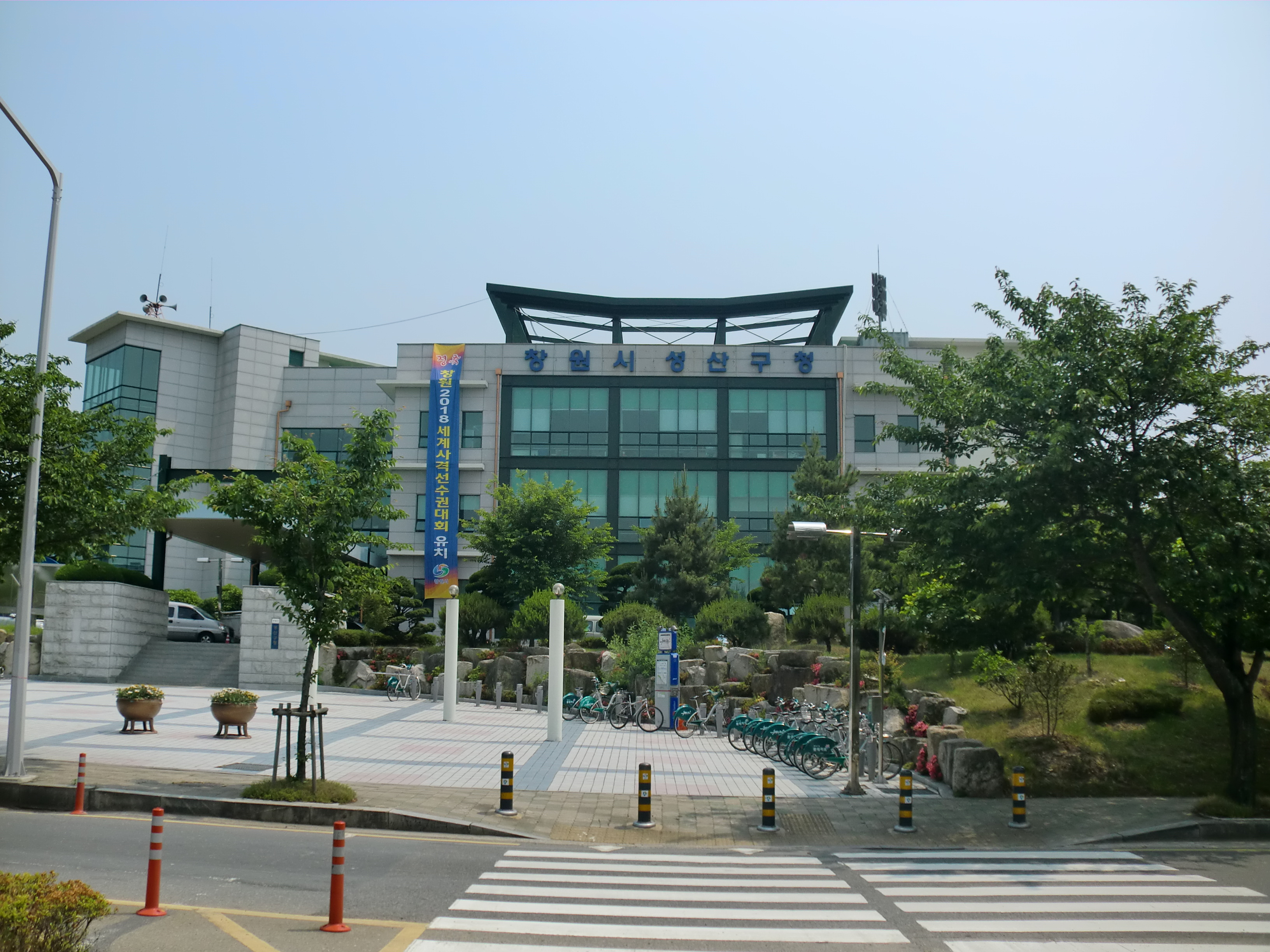 경상남도 창원시 성산구에 있는 성산구청